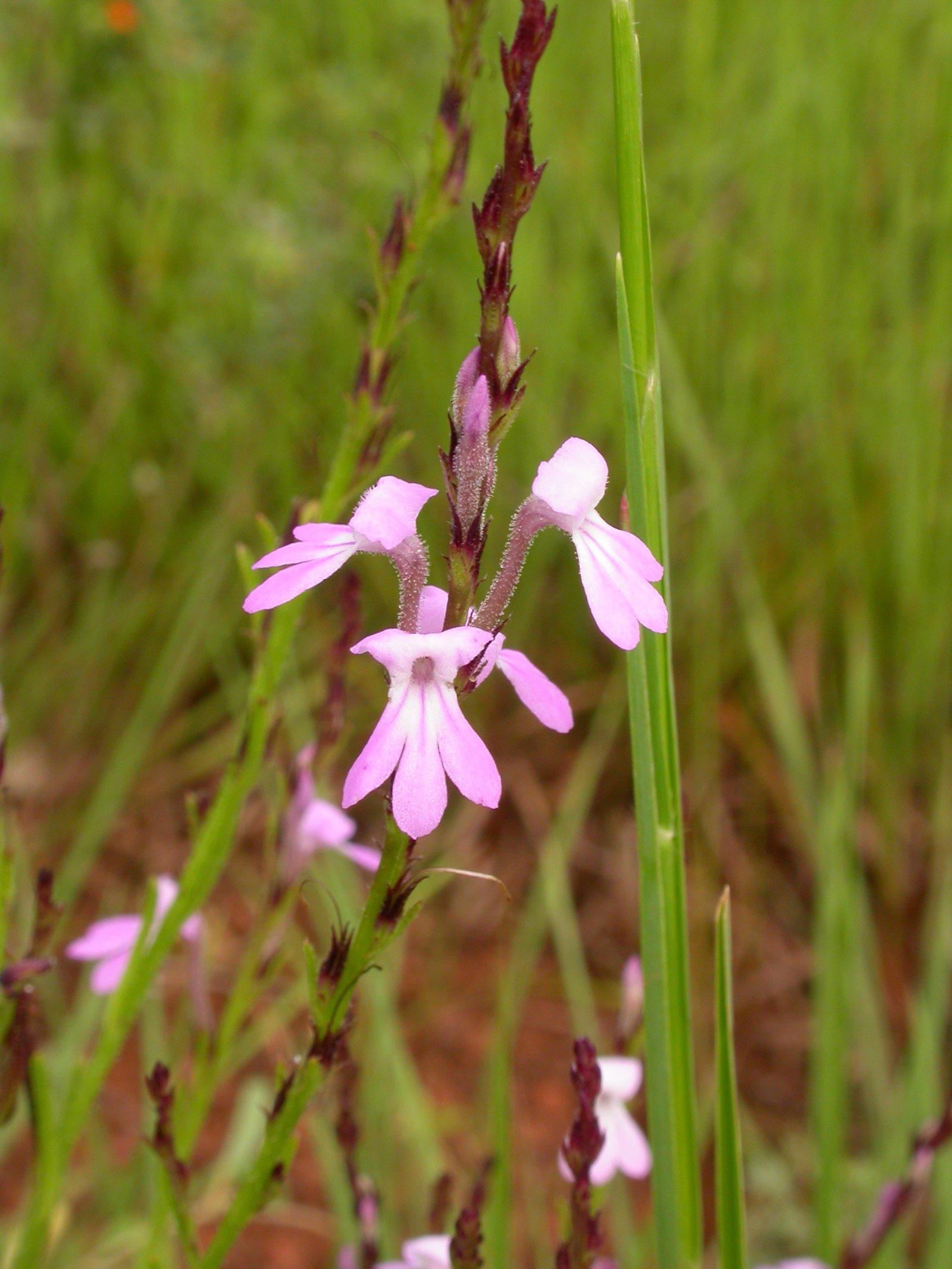 Striga bilabiata, nahe Gaoua, Burkina Faso.